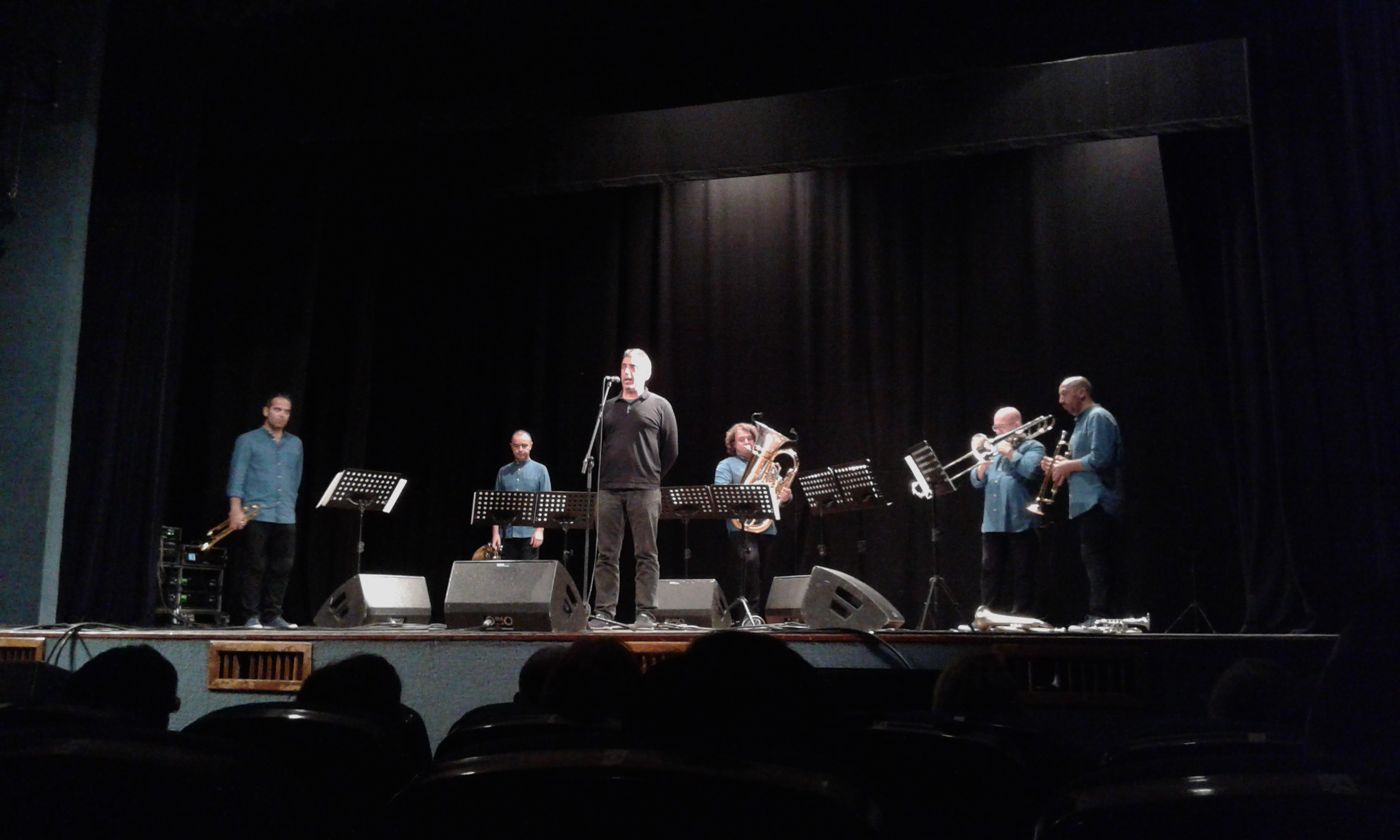 Pepe Gimeno Botifarra amb Spanish Brass Luur Metalls a la casa de cultura de Museros